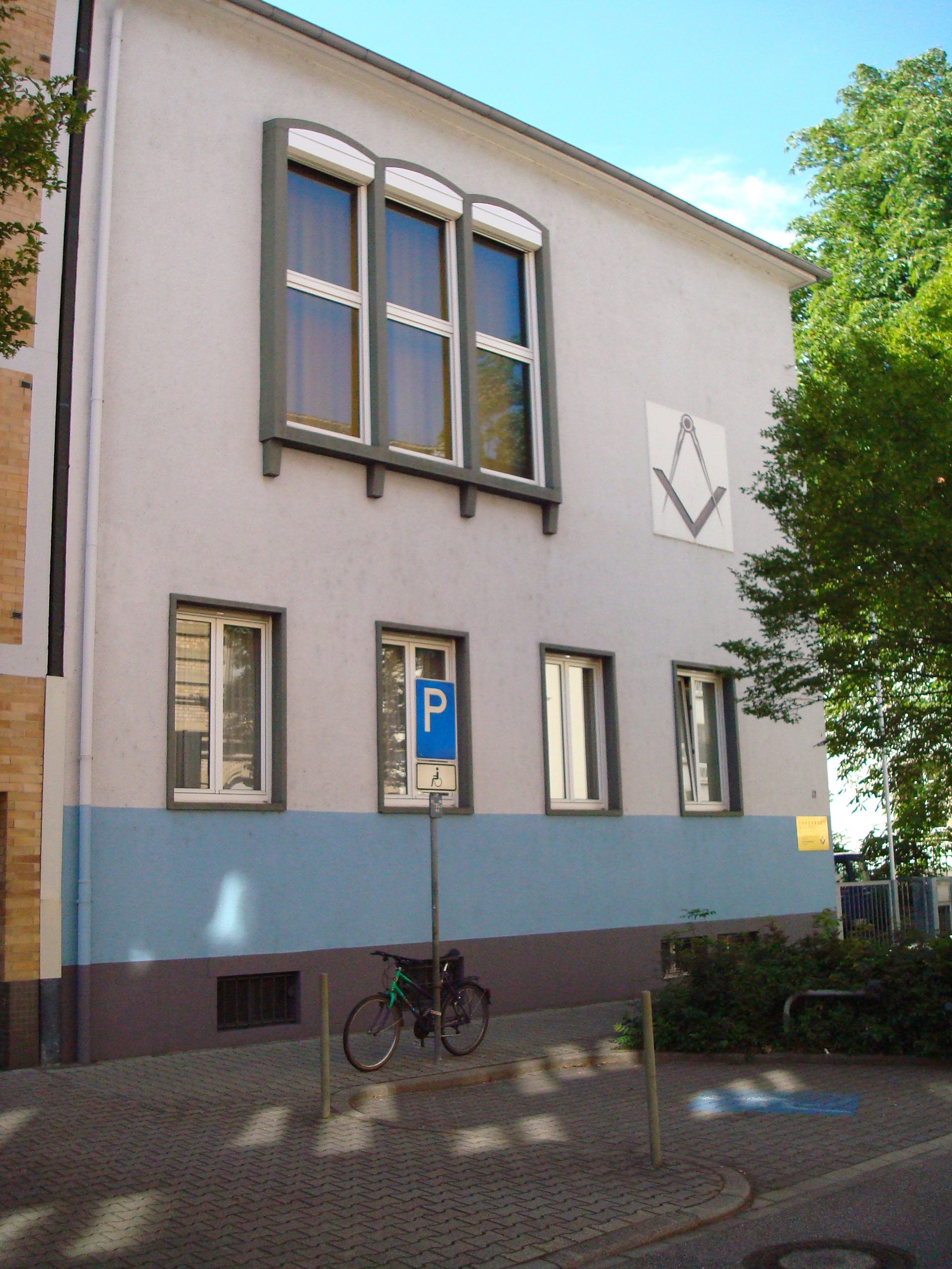 Logenhaus Mannheim der Freimauererloge Carl zur Eintracht, Baujahr 1952